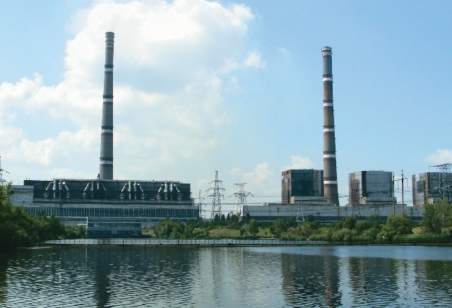 Запорожская ТЭС, Энергодар